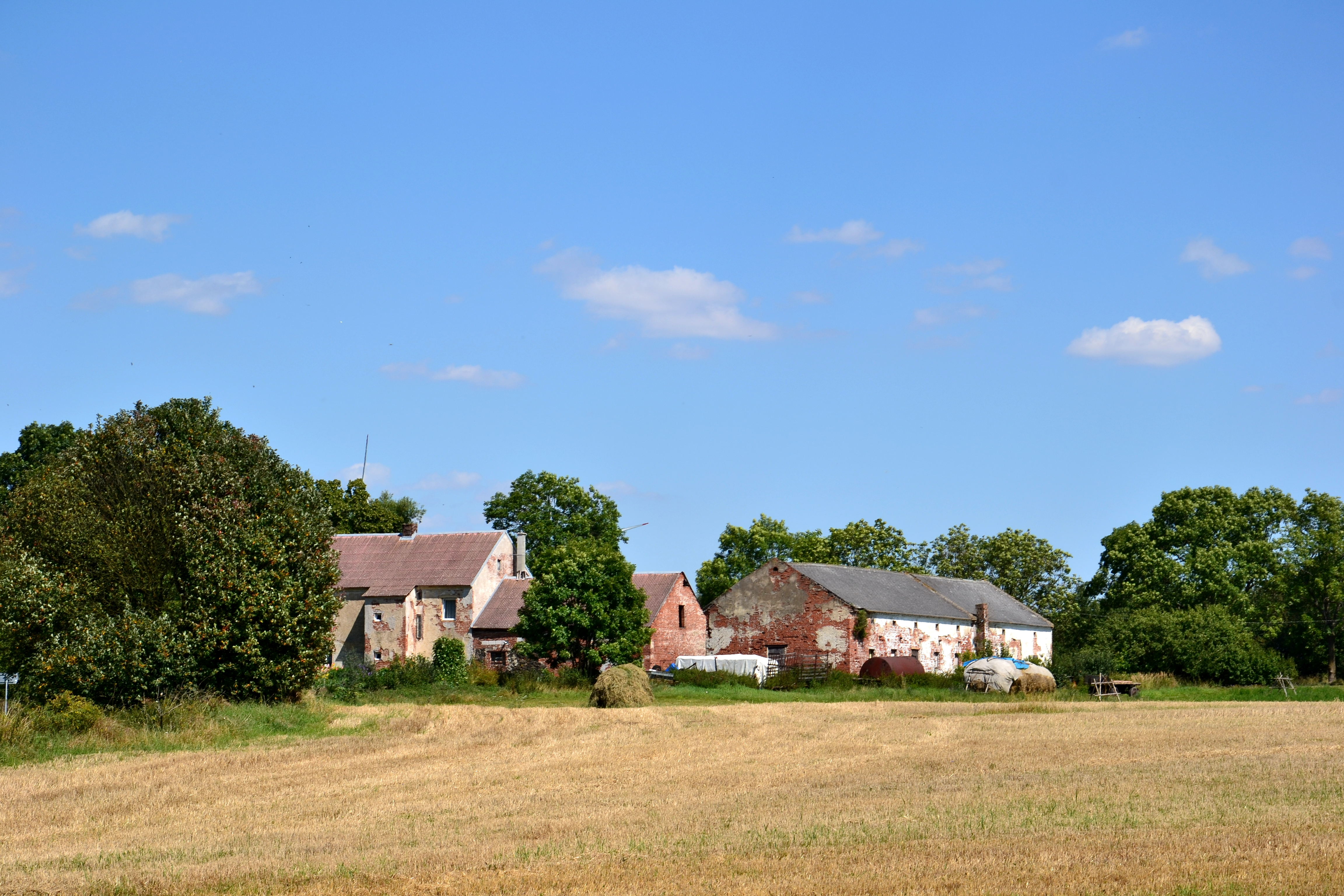 Pohled od jihozápadu na usedlost čp. 6